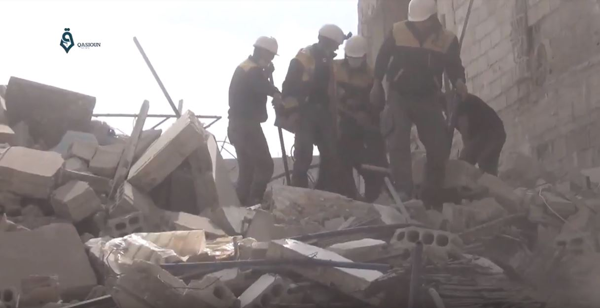 Des casques blancs déblayant des décombres dans la à Arbin, dans la Ghouta orientale, le 6 février 2018.